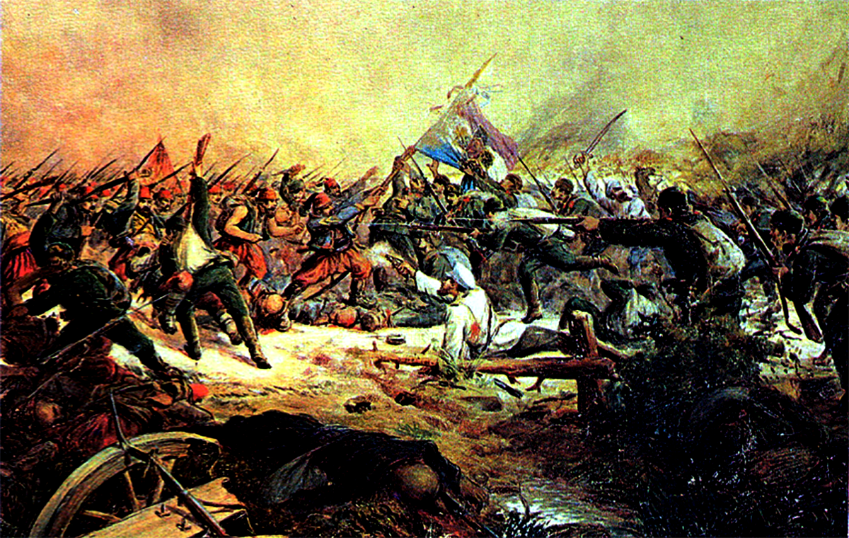 Битката при Стара Загора-1877 г.